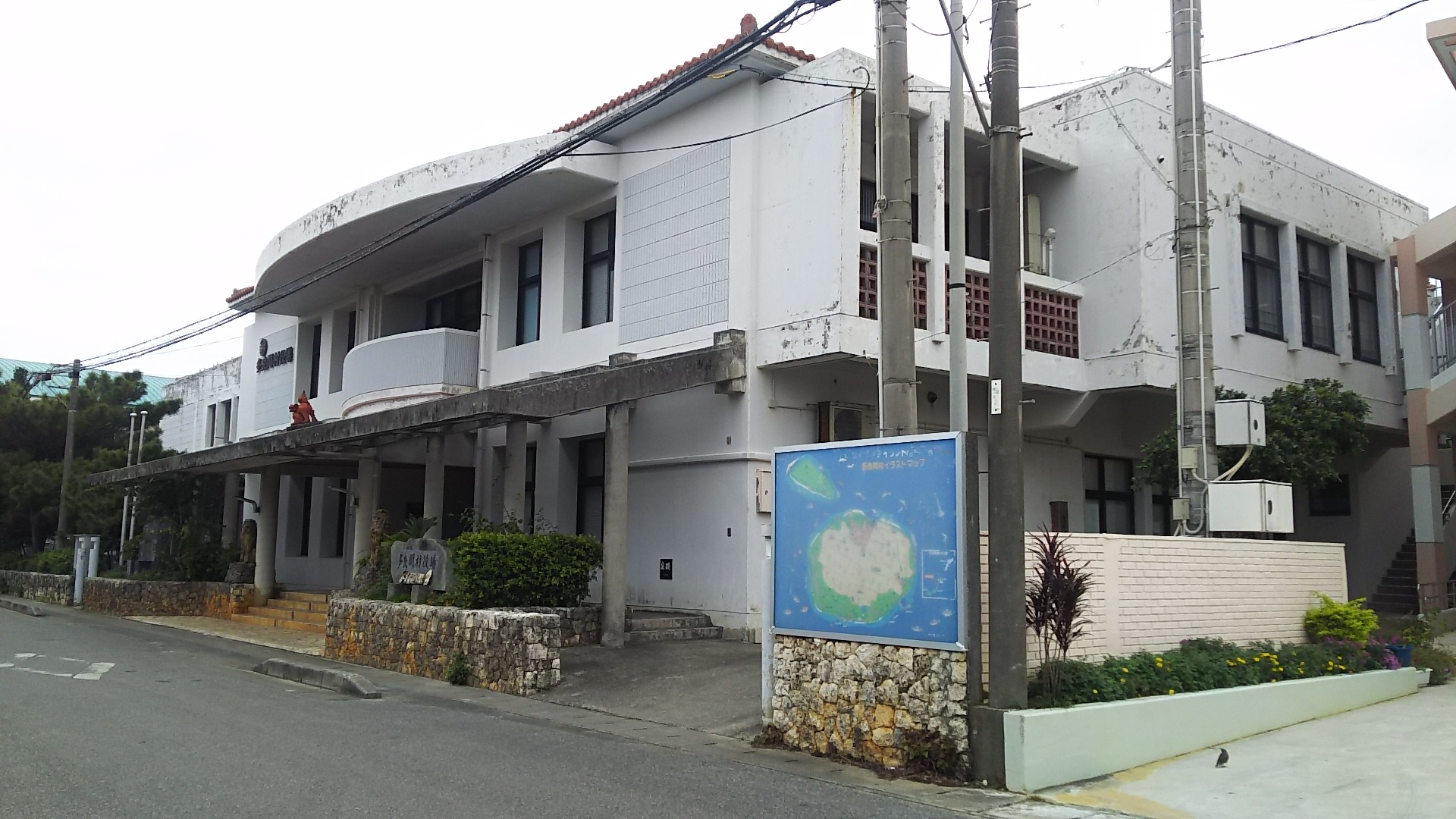 多良間村役場全景